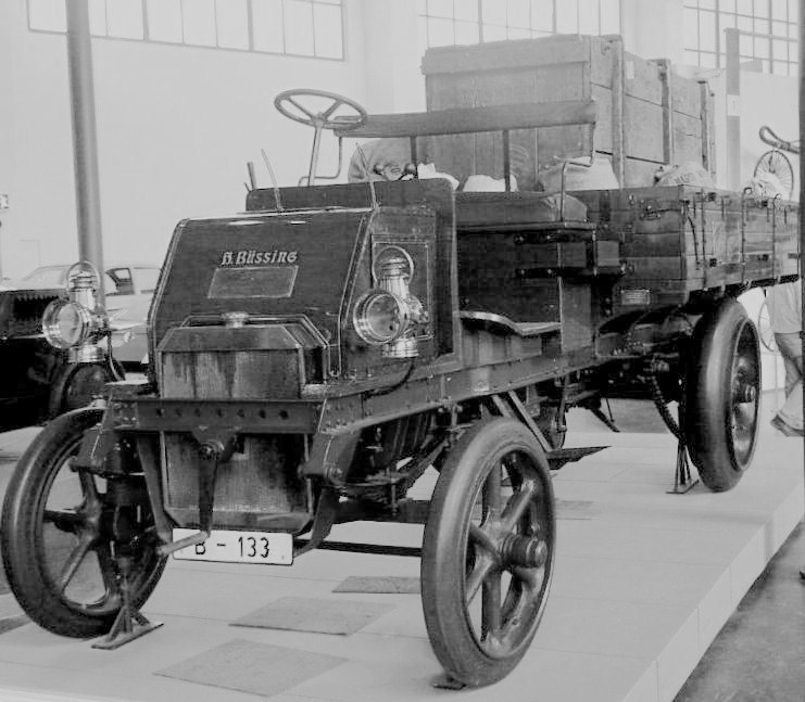 Büssing LKW "ZU 550 01" (der erste Büssing LKW aus dem Jahr 1903) Bild wurde bearbeitet und wieder hochgeladen